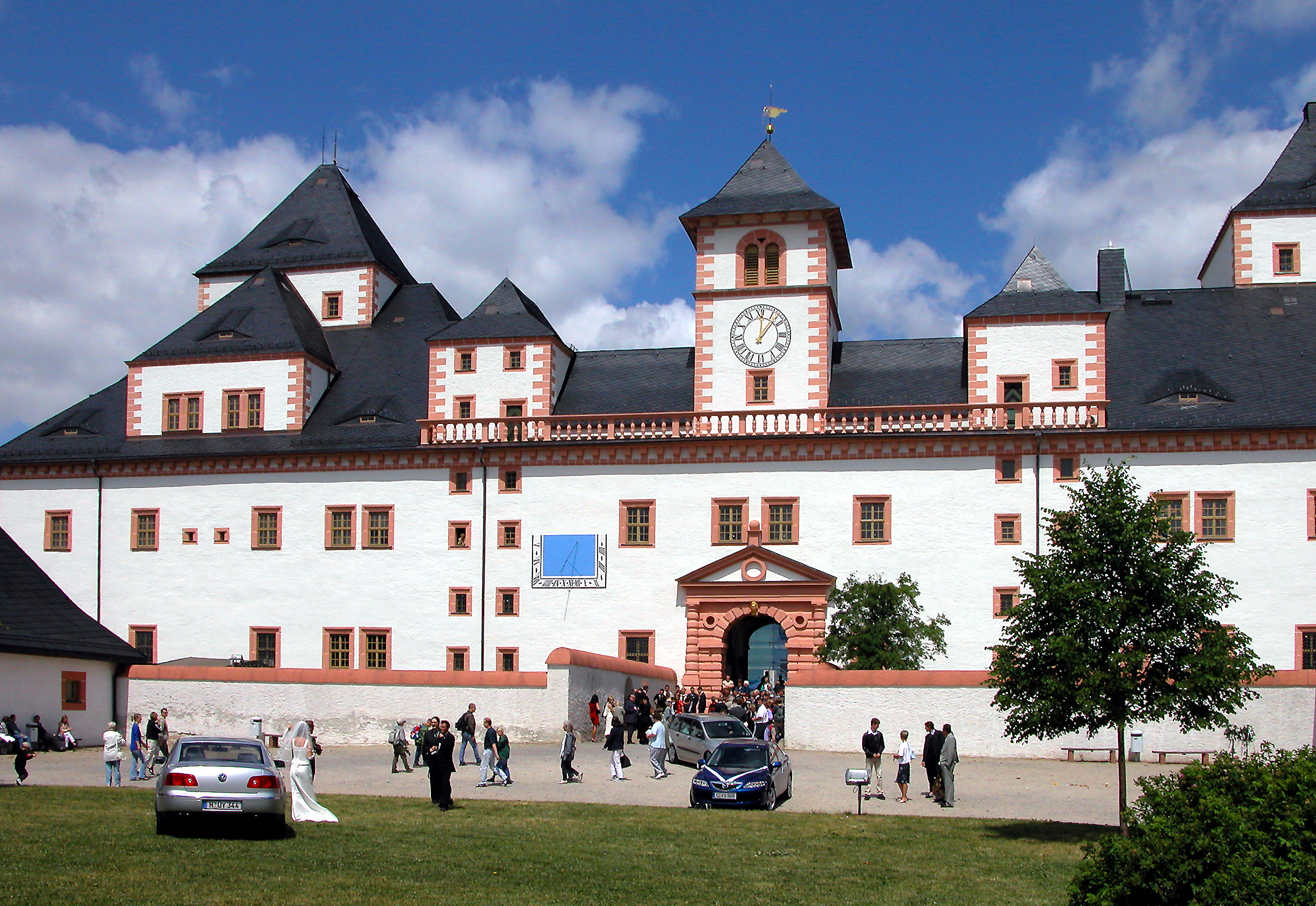 21.06.2003 09573 Augustusburg: Jagdschloß (GMP: 50.812843,13.099362) auf älterer Grundlage. Renaissancebau, im Auftrag von Kurfürst August errichtet 1568-1572 von Hieronymus Lotter, unterstützt von E. van der Meer.Oberaufsicht ab 1572 Graf Rochus zu Lynar. Hier: Südflügel vom Vorhof gesehen. [DSCN...]20030621210DR.JPG(c)Blobelt